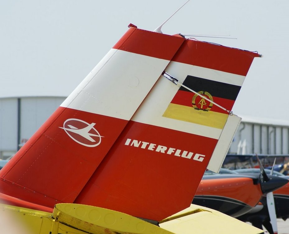 Logo der Interflug auf einer Museumsmaschine